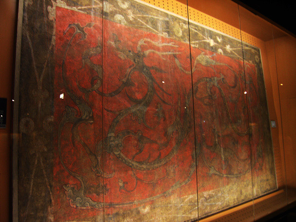 四神云气图. The Four Symbols mural from the tomb of Liu Wu, prince of Liang. 2nd century BC.